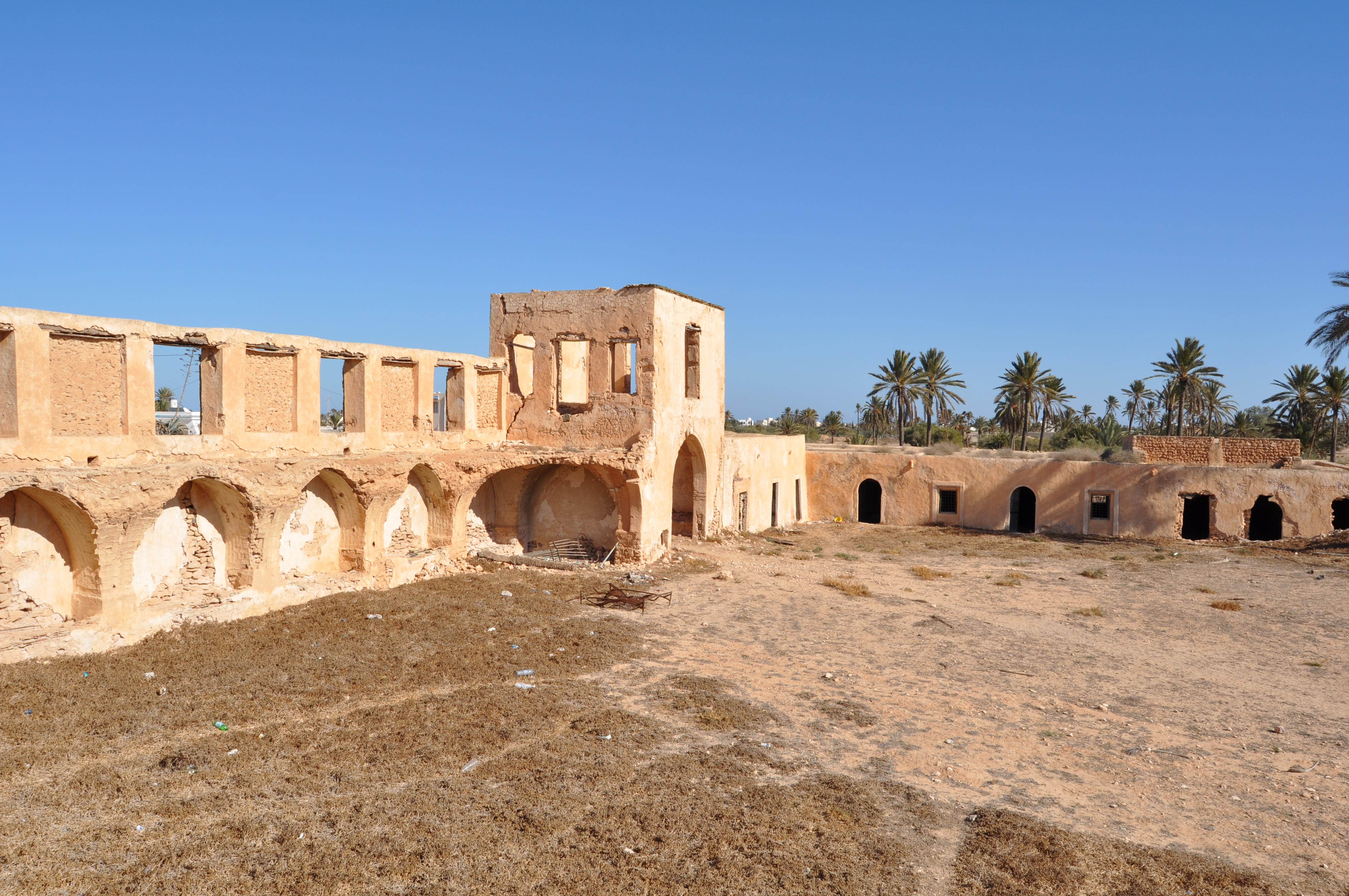 ancien palais du caïd Hamida Ben Ayed,fut construit au 18e siècle.